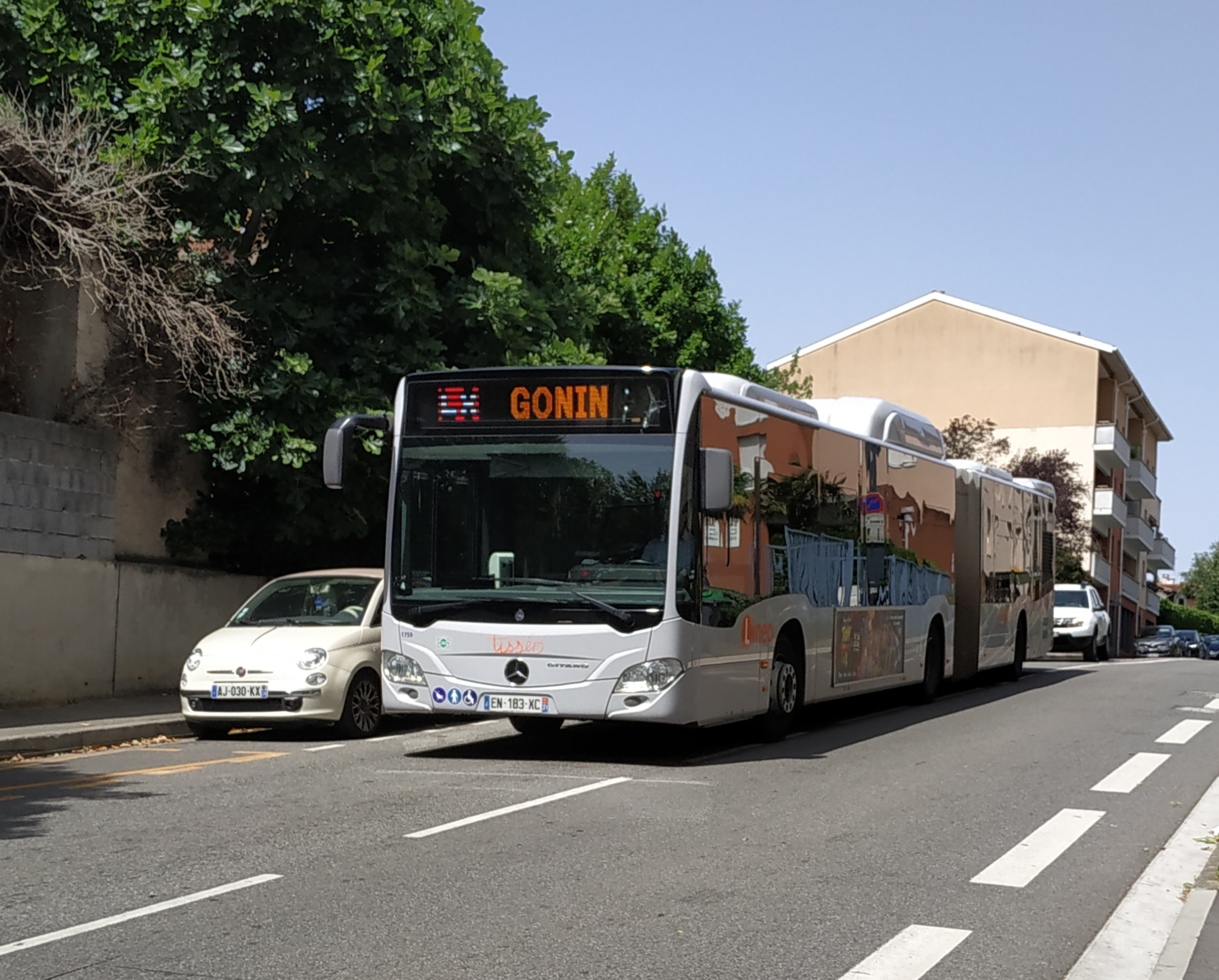 Mercedes-Benz Citaro G au gaz naturel à Toulouse